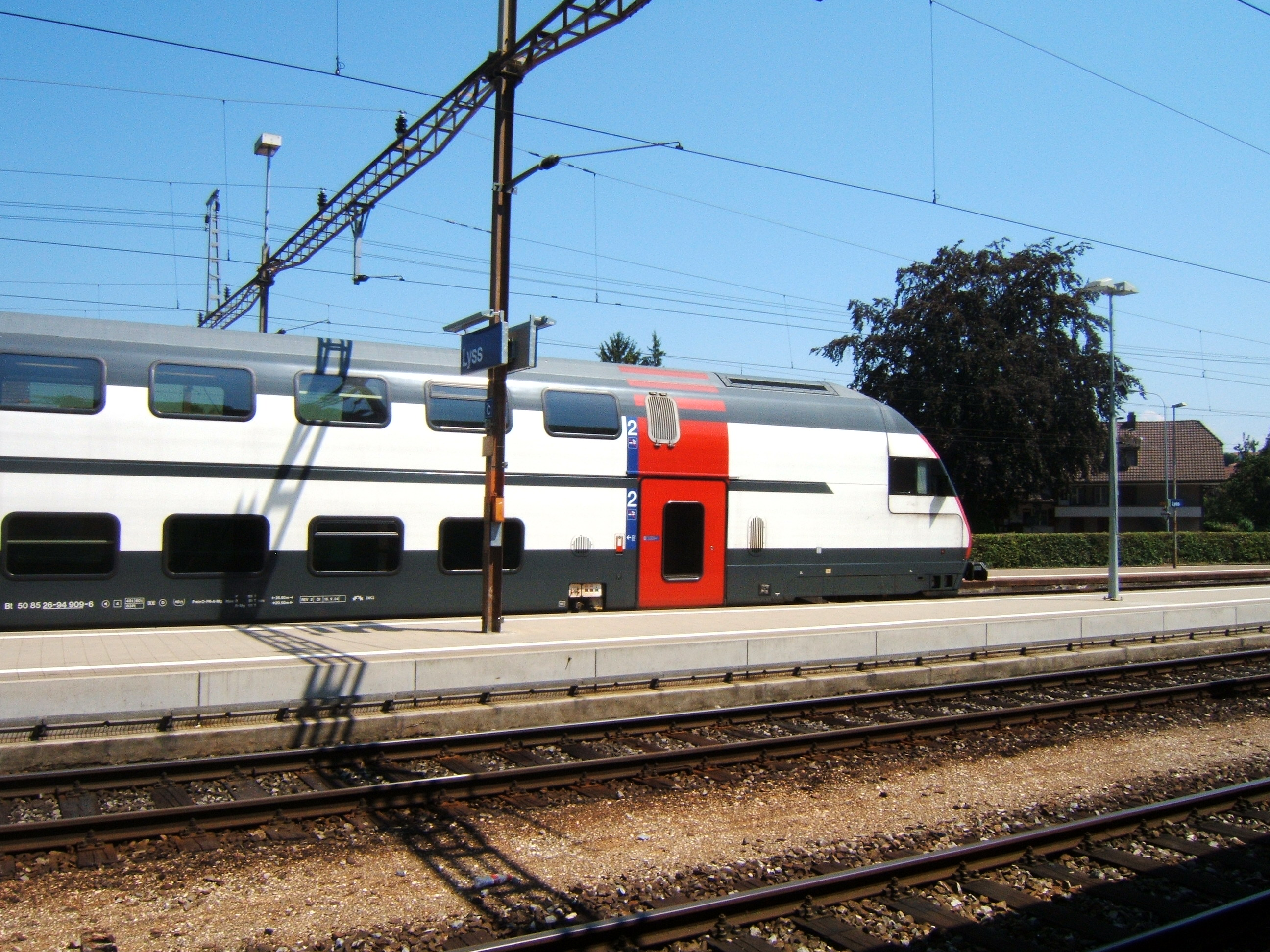 Dubbeldekker IC trein